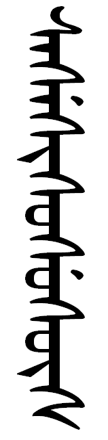 сасэсисосусуус